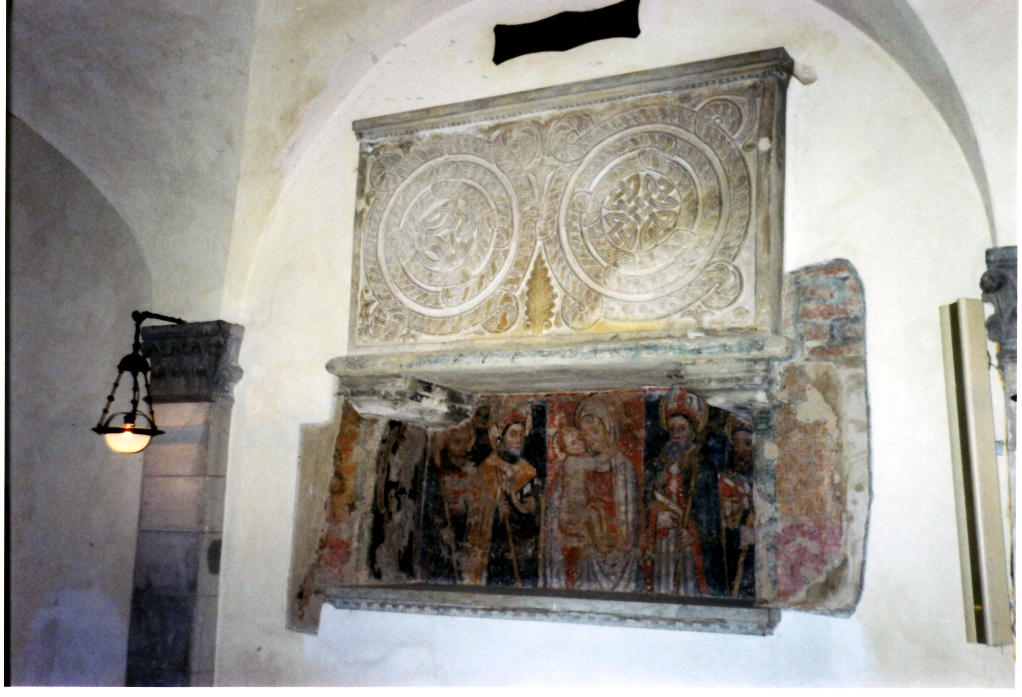 opera propria,foto,Sepolcro di S.Cumianus (+736), Abate di Bobbio - Cripta dell'Abbazia di S. Colombano - Lastra sepolcrale di epoca longobarda con fregi celtici,licenza libera